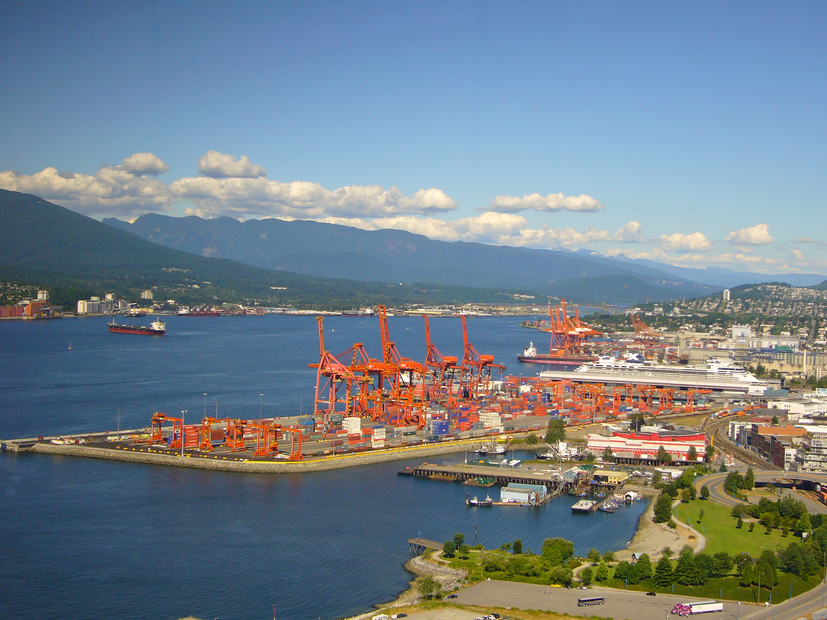 Photo d'une zone portuaire de Vancouver prise en 2006 de la Lookout Tower